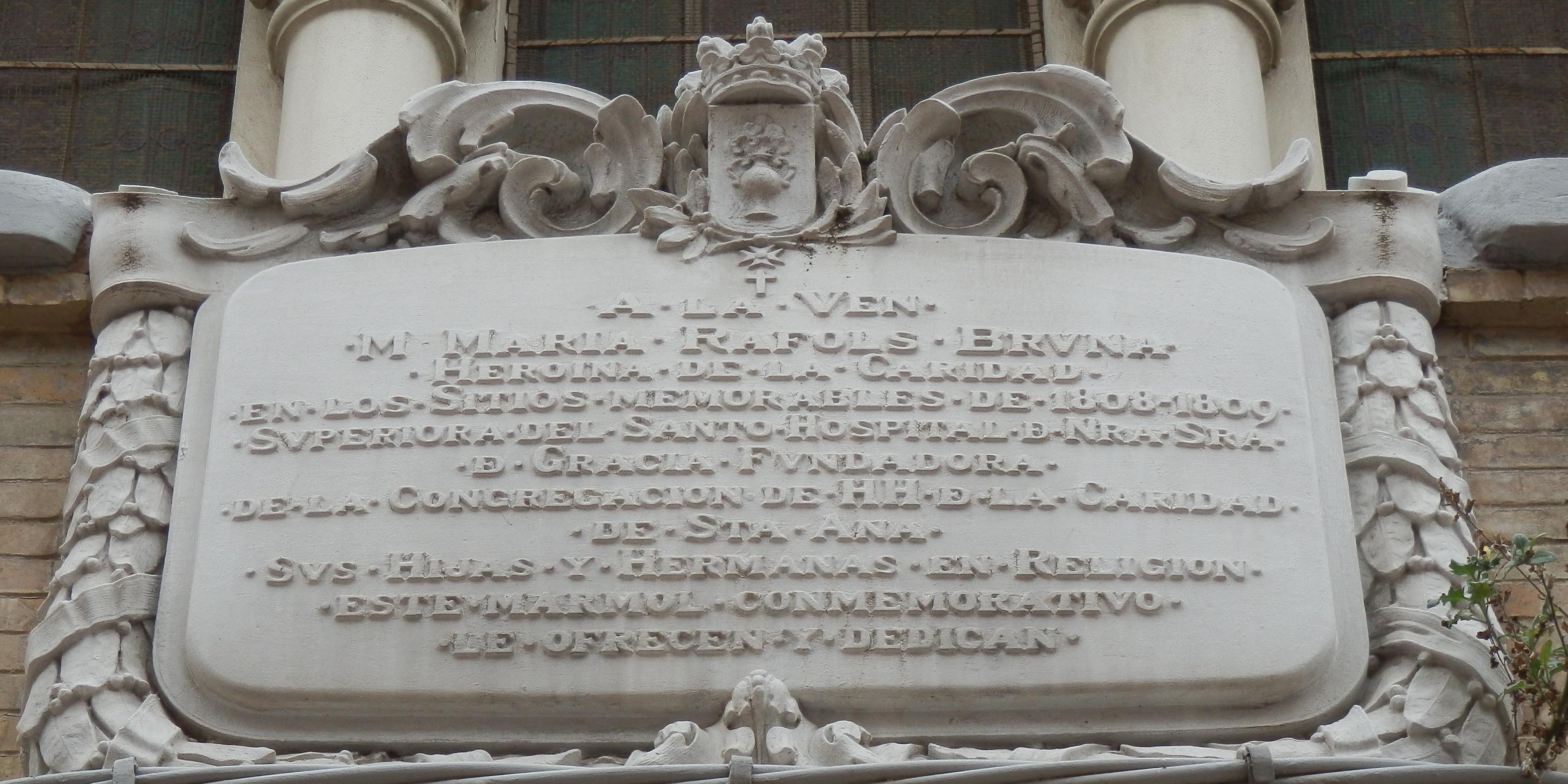 Placa dedicada a la Madre María Rafols Bruna en el Convento de Santa Ana de Zaragoza.